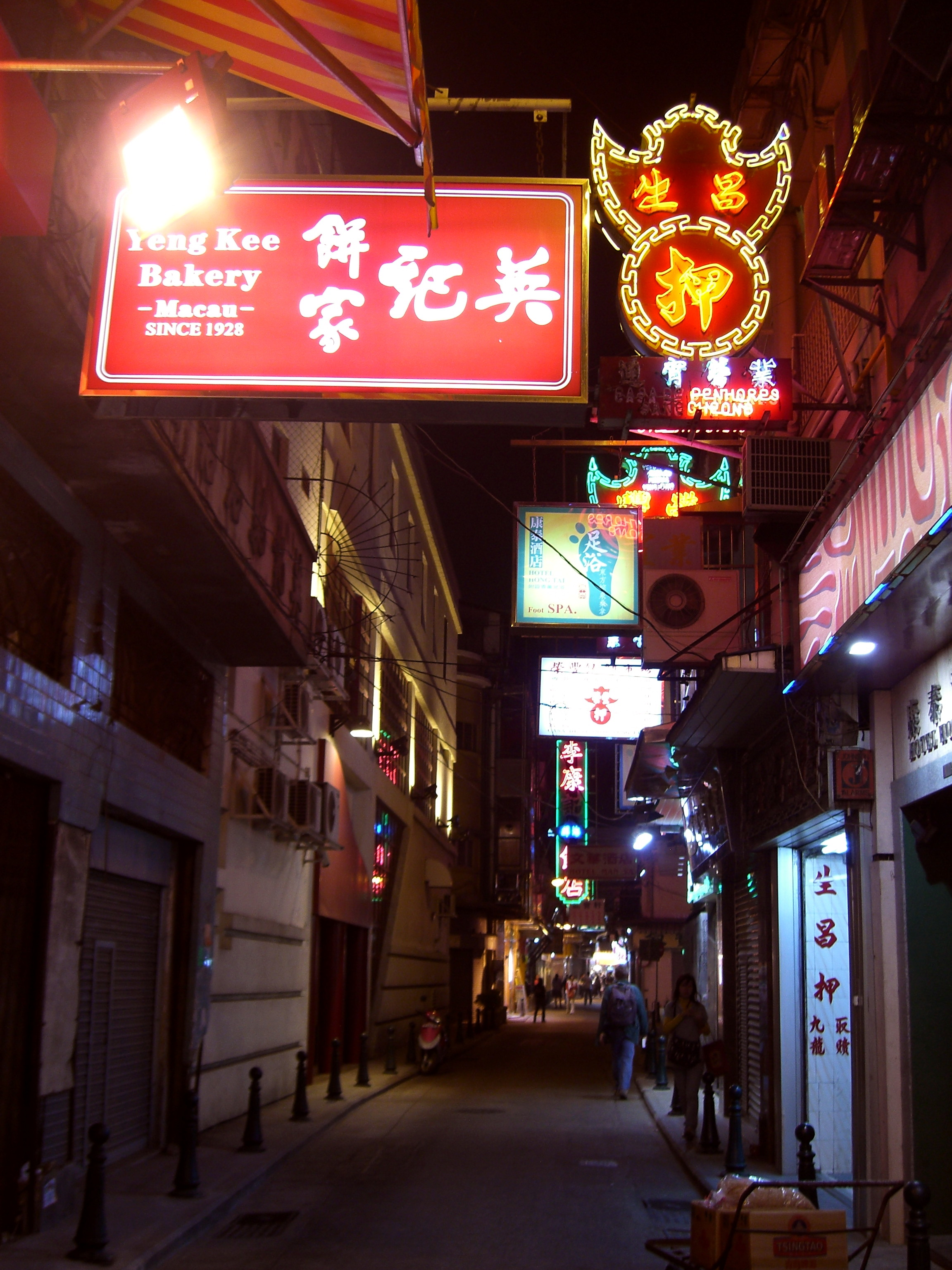 Rua da Caldeira in Macau